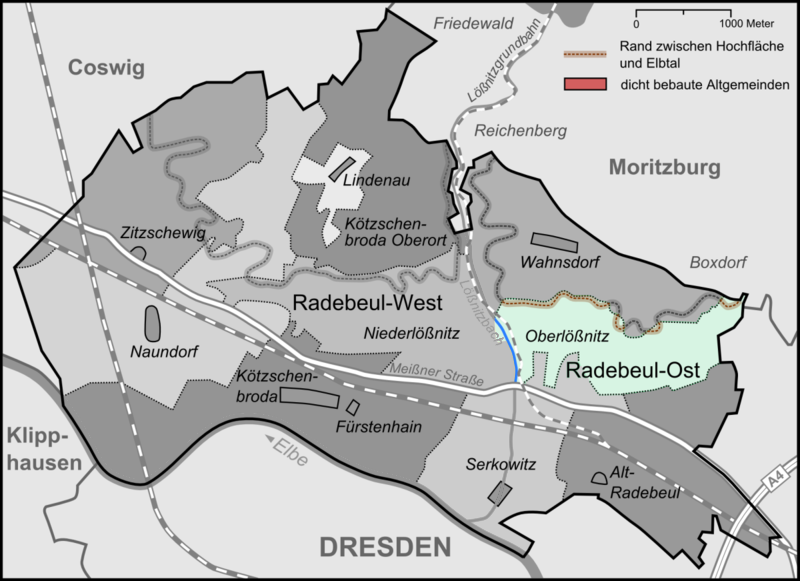 Karte der Stadtteile und Umlandgemeinden Radebeuls, hier Stadtteil Oberlößnitz